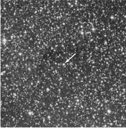 Position de Proxima Centauri